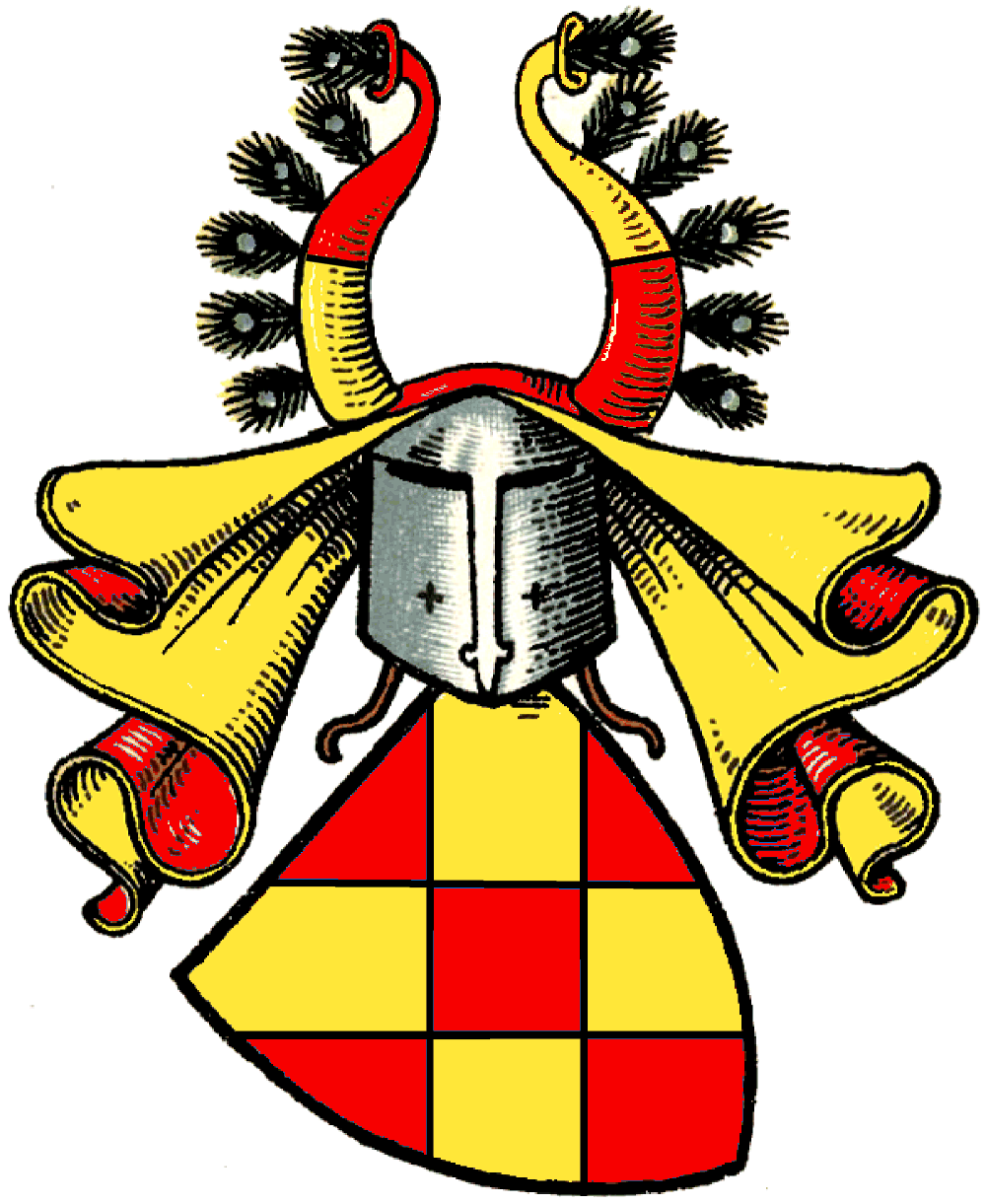 Wappen der Grafen von Fürstenberg (Havel), Tingierung nach Bagmiehl